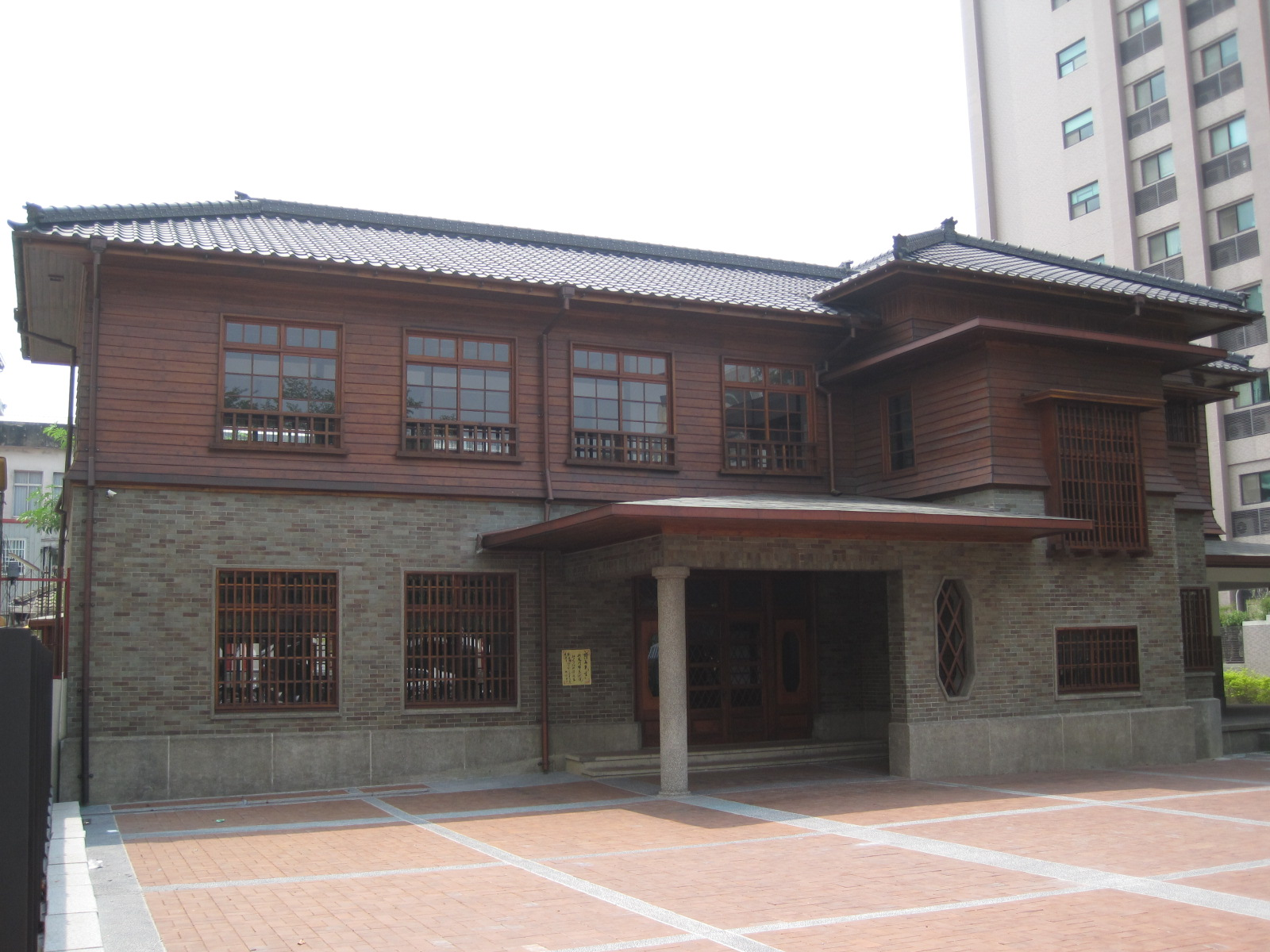 原台南愛國婦人會館